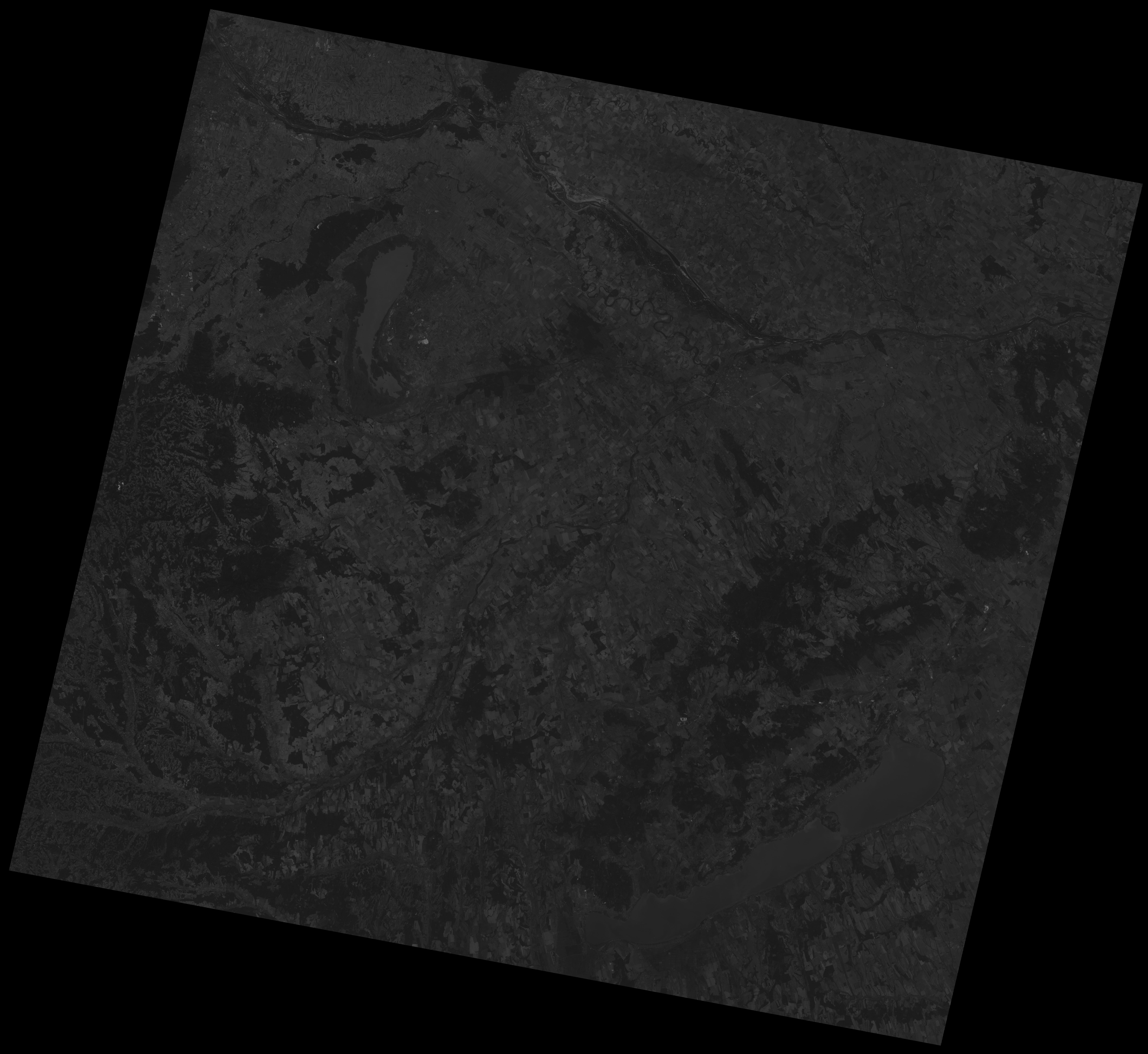 A Landsat-5 felvétele az Észak-Dunántúlról a zöld (2-es) sávban